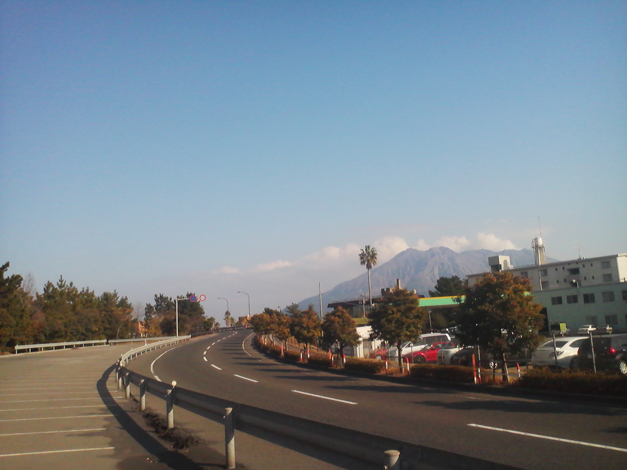 国道10号鹿児島北バイパスを石橋記念公園前から姶良方面を望む